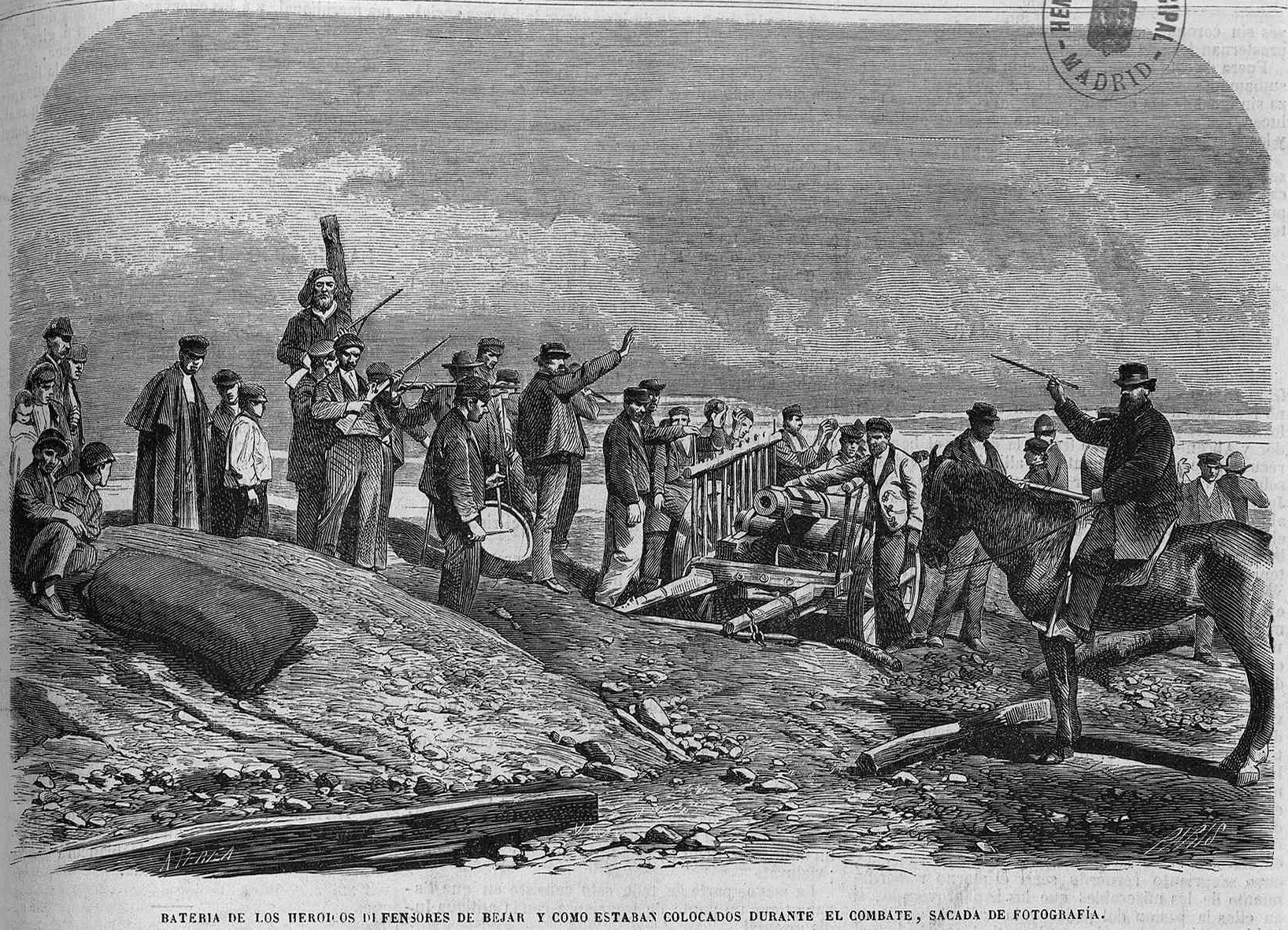 «Batería de los heroicos defensores de Béjar y cómo estaban colocados durante el combate, sacada de fotografía», en la revista española El Museo Universal.